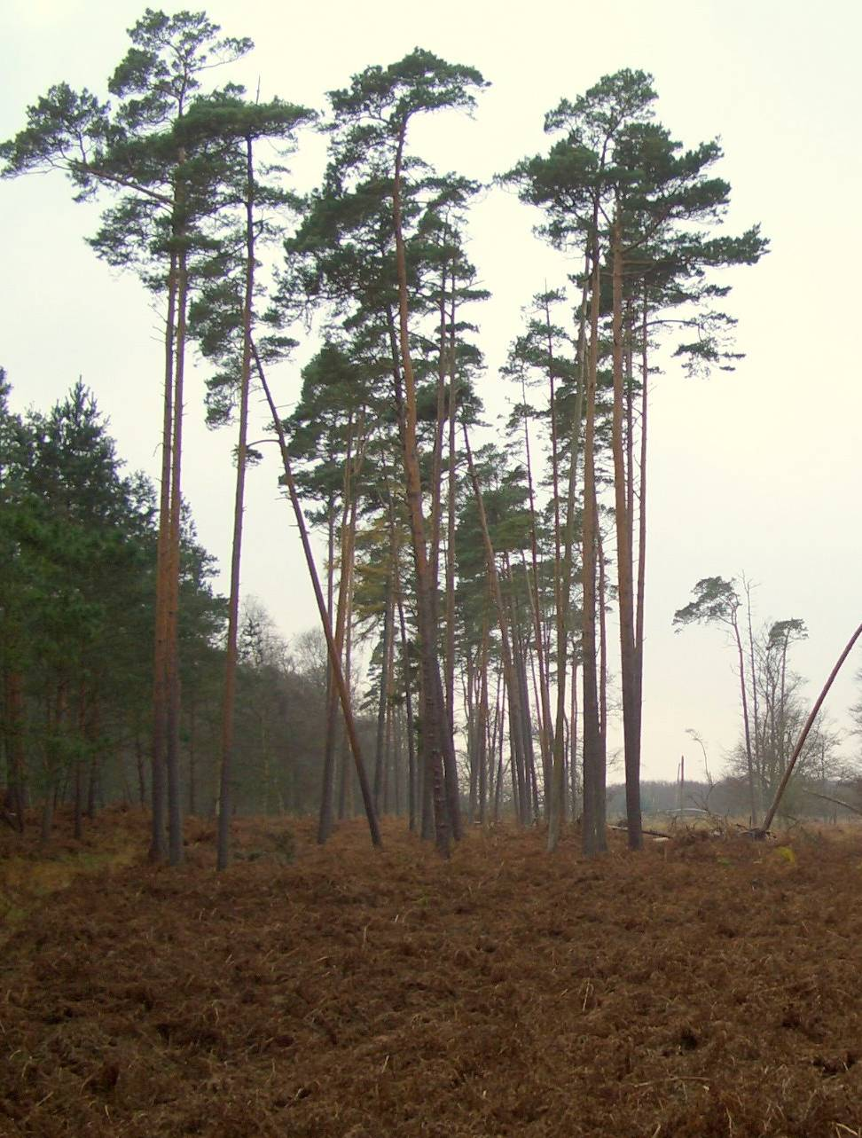 Darßwald in Mecklenburg-Vorpommern. Küstenentfernung (Weststrand) ca. 200m.